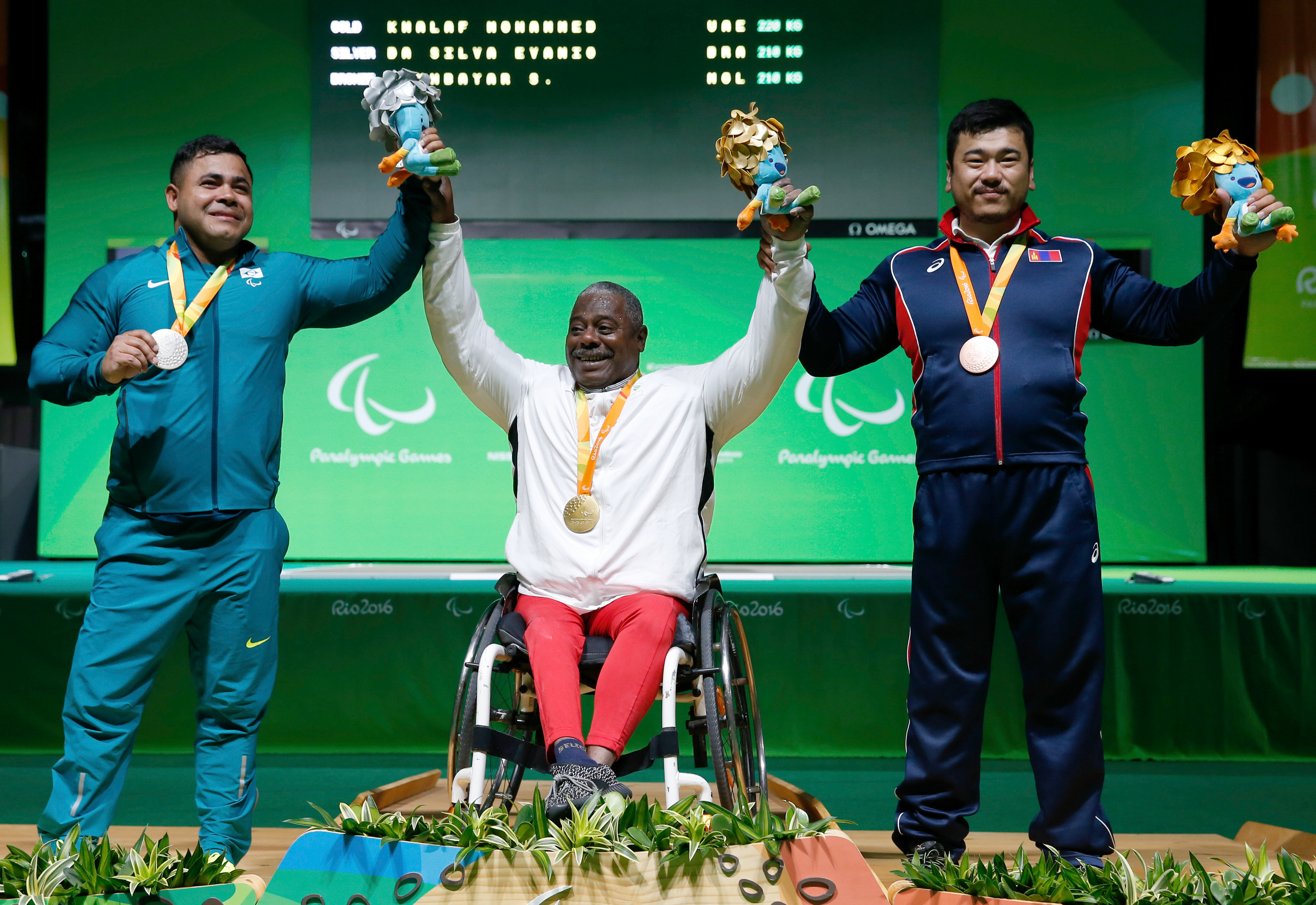 Rio de Janeiro - Evanio da Silva ganha medalha de prata para o Brasil no levantamento de peso, categoria 88 kg, vencida por Mohammed Khalaf, dos Emirados Árabes, com Sodnompiljee Enkhbayar, da Mongólia em terceiro nos Jogos Paralímpicos Rio 2016